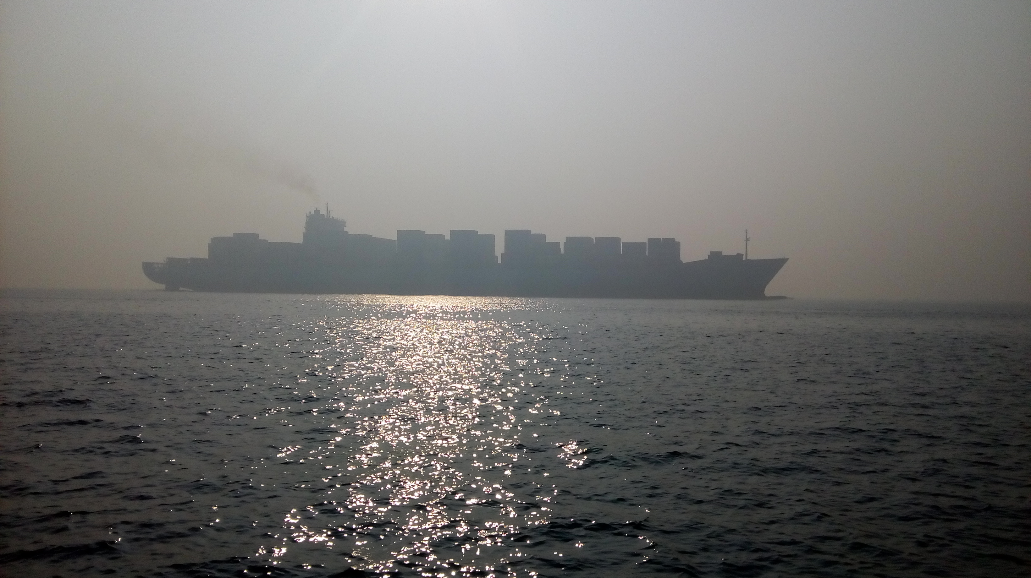 एलिफन्टा कॅव्हेस छायाचित्रे